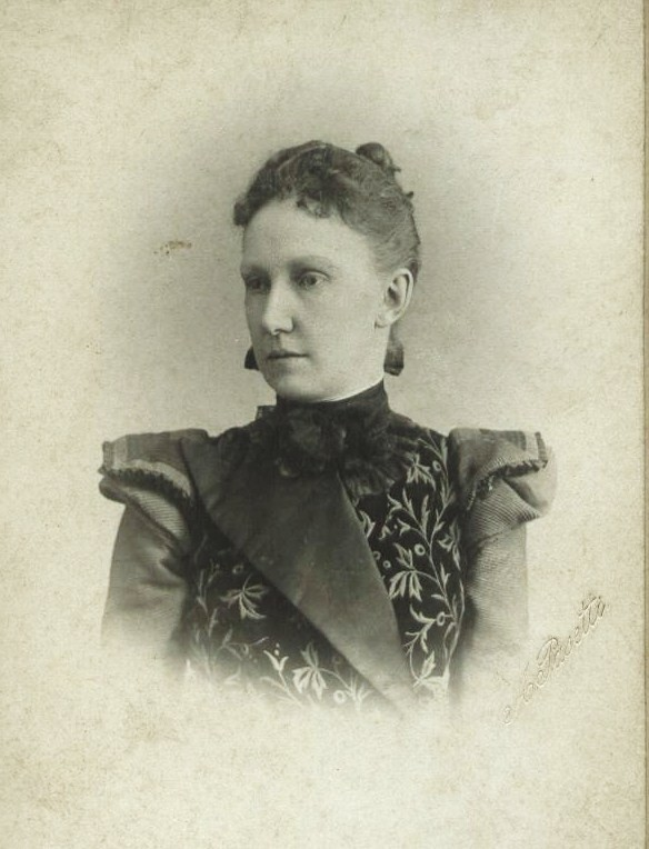 Мария Владимировна Вяземская, ур. Левашова (1859—1938)